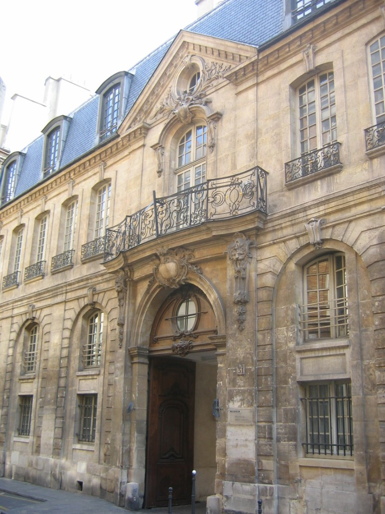 Hôtel d'Albret, Le Marais, Paris.